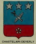 Wappen des chévalier Chastelain-Deverly et d´Empire (21.12.1808)